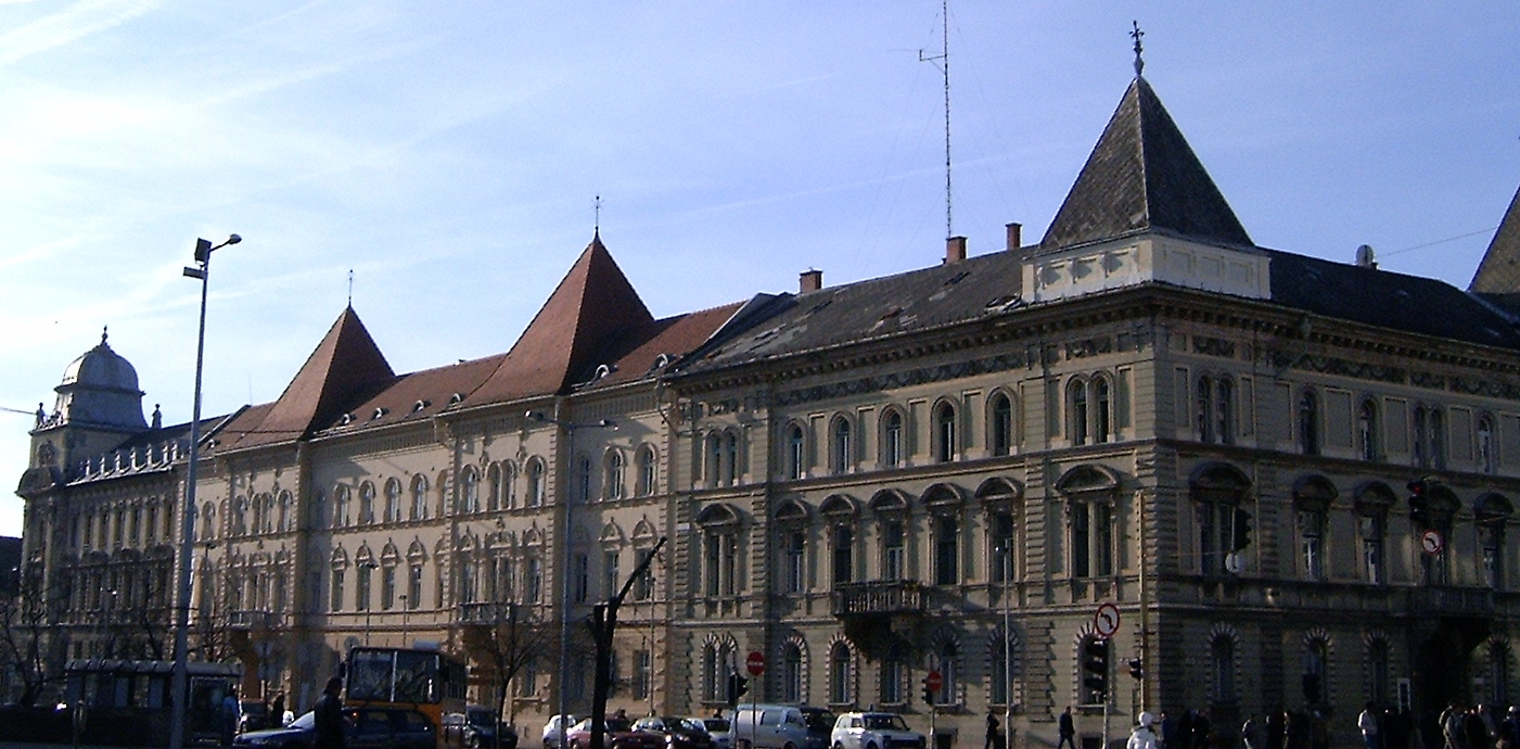 A győri Városház tér egy részlete